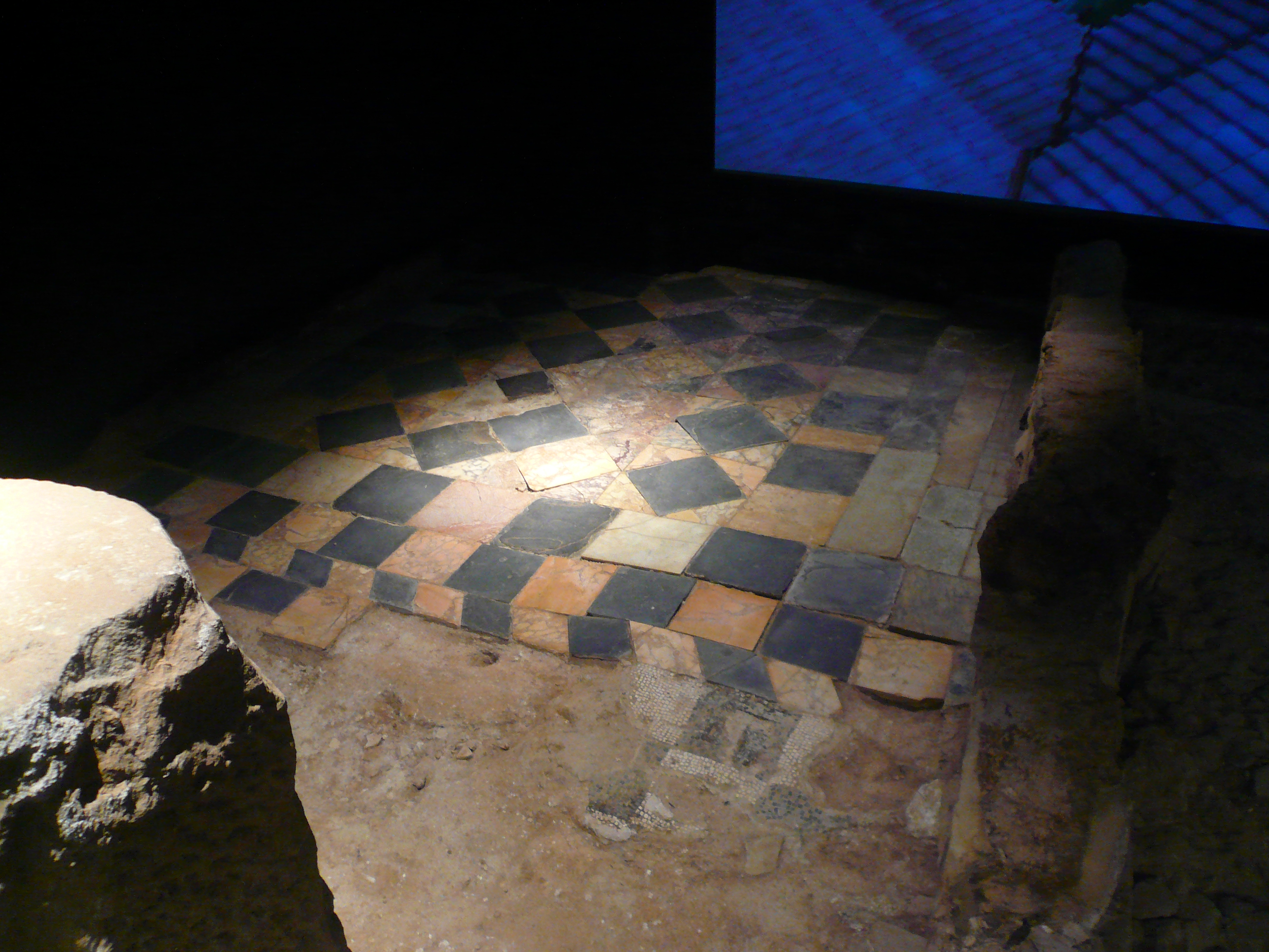 Domus del carrer d'Avinyó.